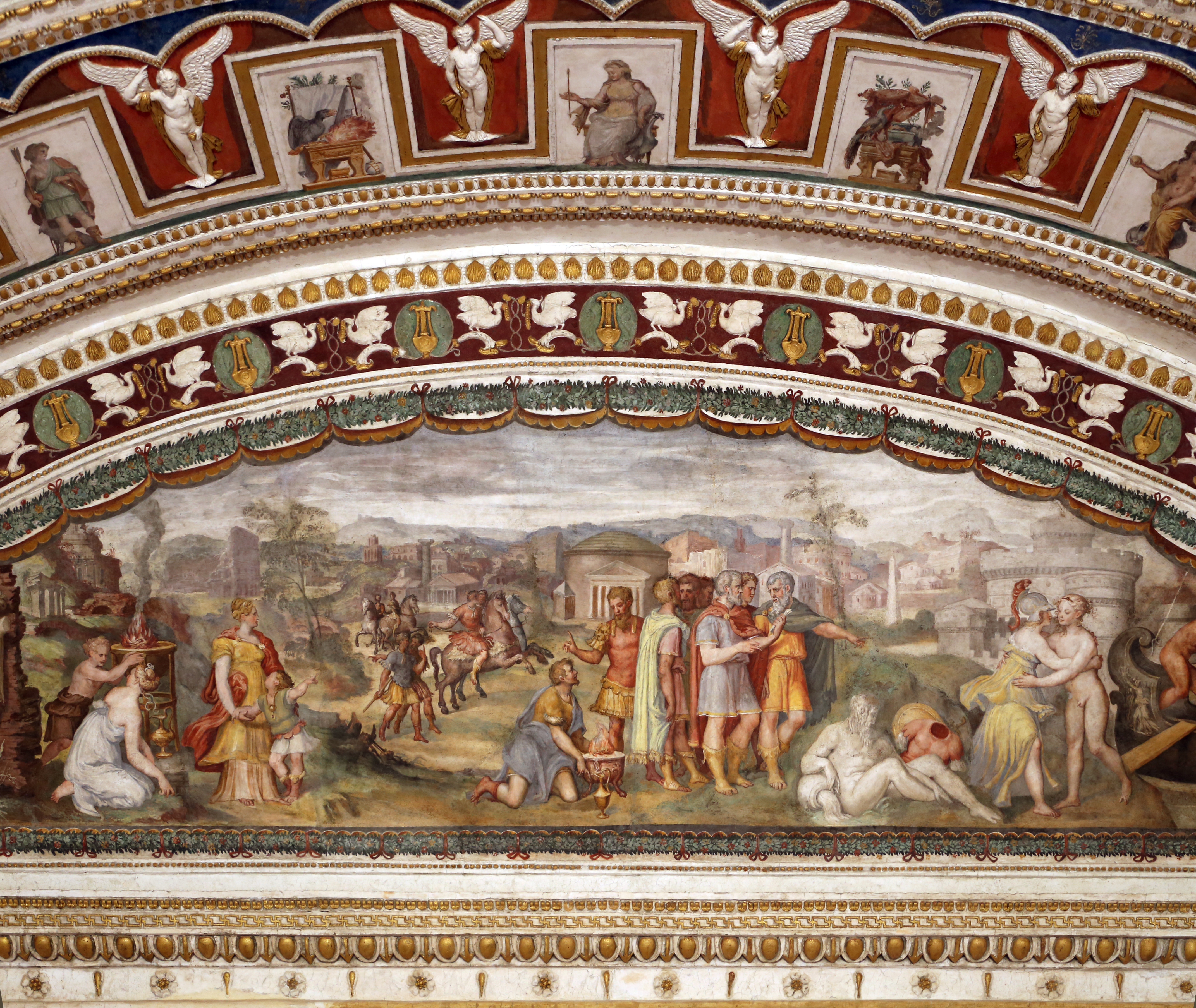 Palazzo Grimani a Santa Maria Formosa (Venice) - Stanza di Apollo This is a photo of a monument which is part of cultural heritage of Italy.